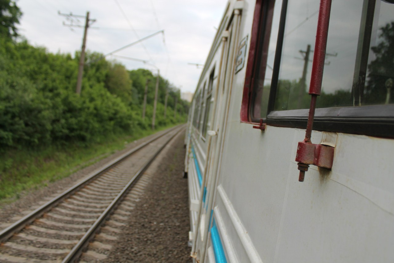 Задній зацеп на міській електричці в Києві.